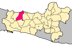 locator pemalang